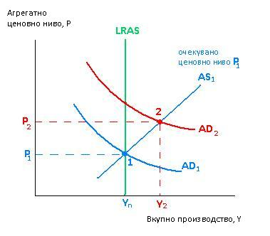 Економијата е во точка 1 во пресекот на AD1 и AS1.Експанзивната политика ја поместува кривата на AD1 до AD2, но поради тоа што ова е неочекувано, краткорочната крива на агрегатната понуда останува фиксна на AS1. Еквилибриумот сега се појавува во точката 2 - стапката на вкупно производство пораснала над природното ниво до Y2 и нивото на цените пораснало до P2.